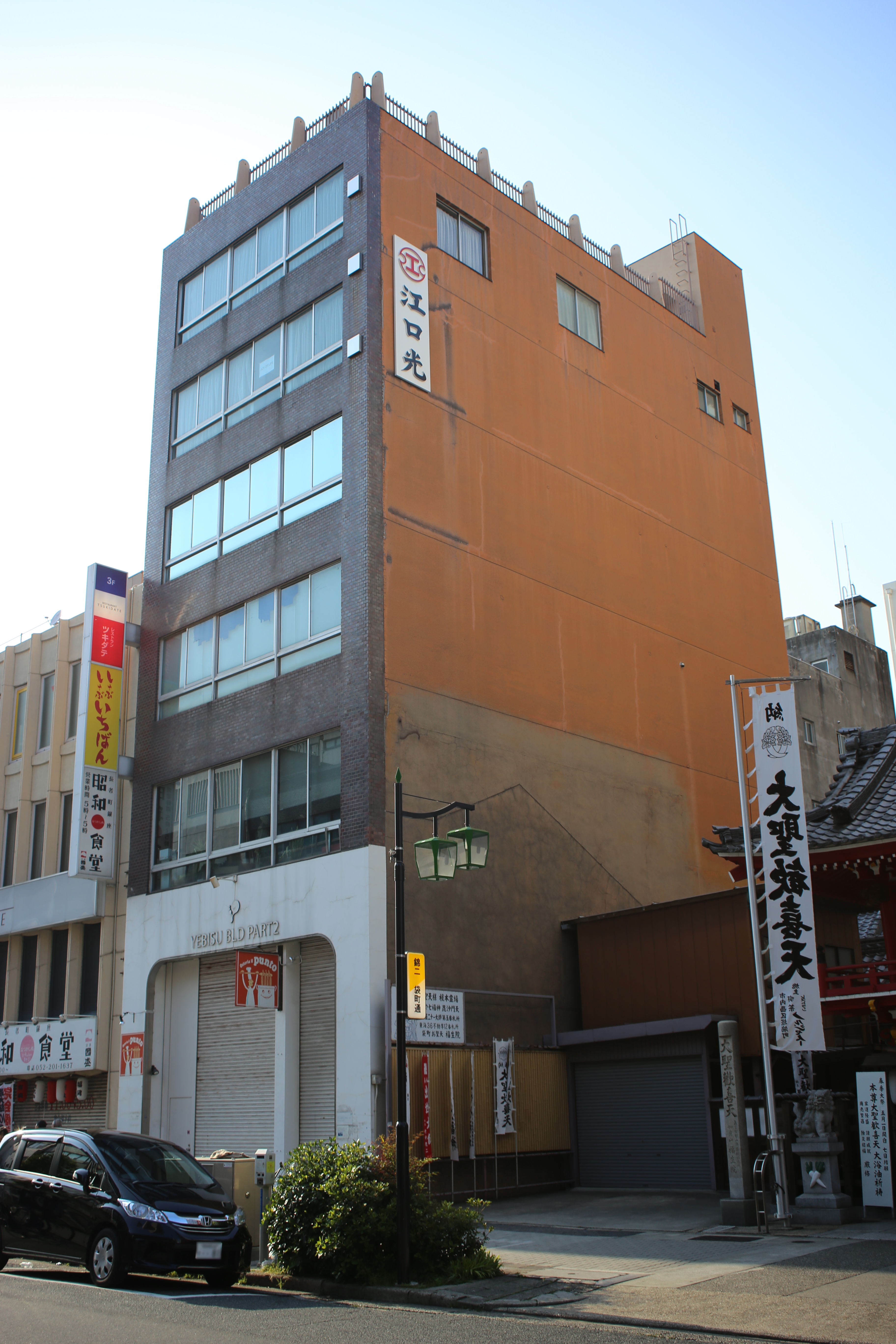 名古屋市中区錦二丁目の長者町えびすビルPART2を南側公道東側より撮影